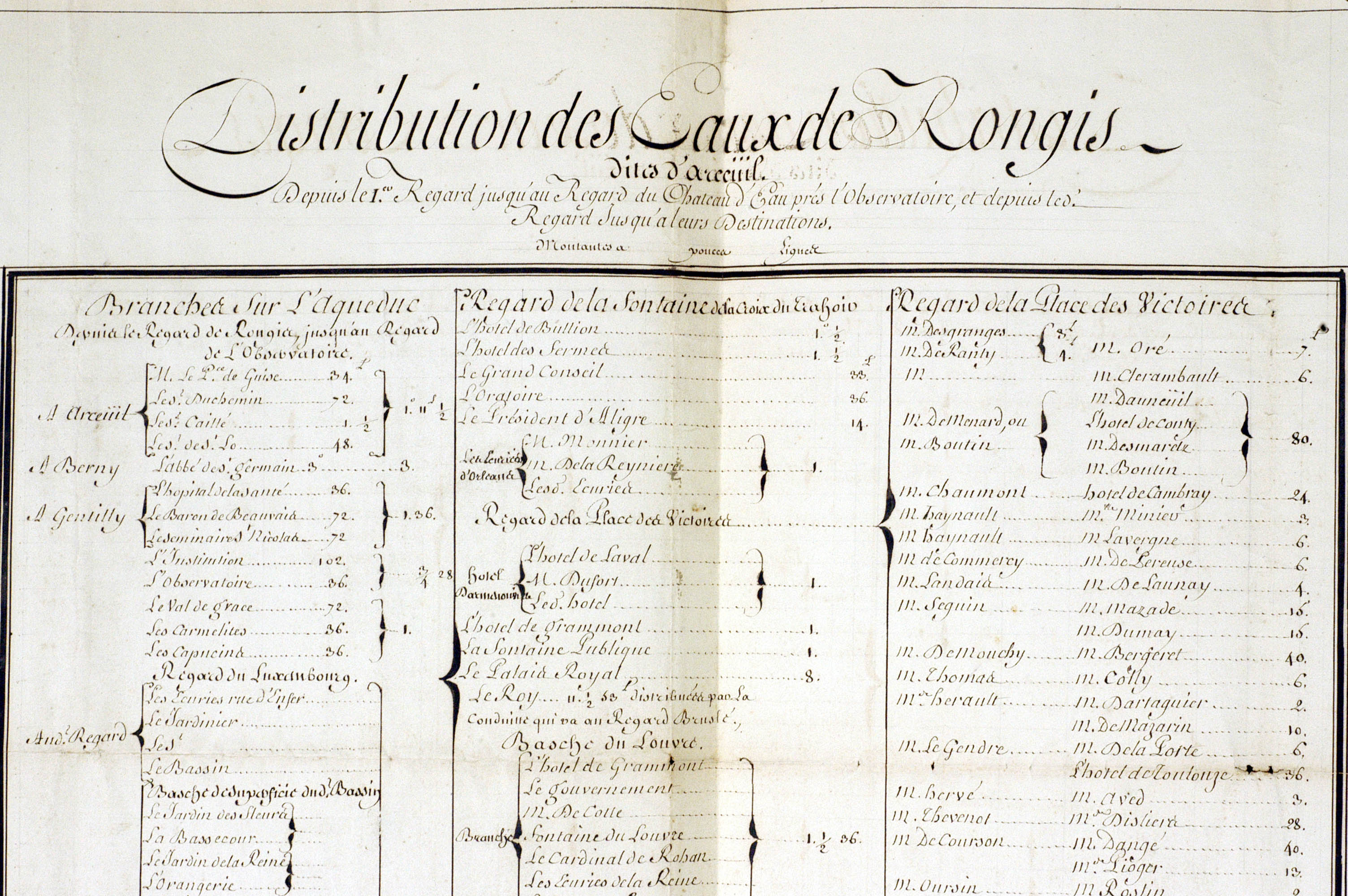 Distribution des Eaux de Rungis au XVIIe siècle. Document conservé aux Archives nationales, Paris (AN, N/III/Seine/626)